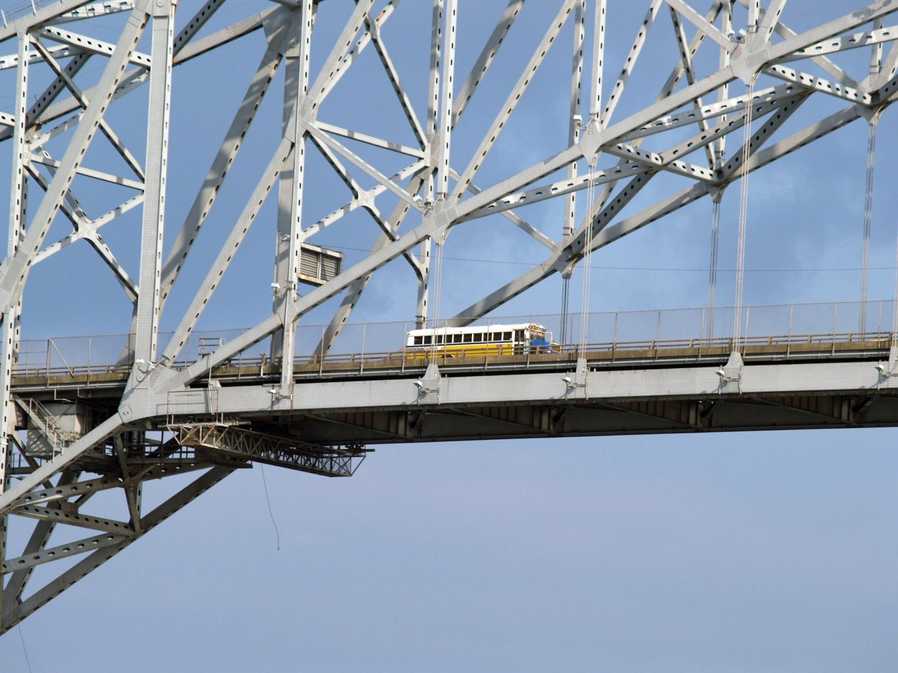 Pan american highway panama